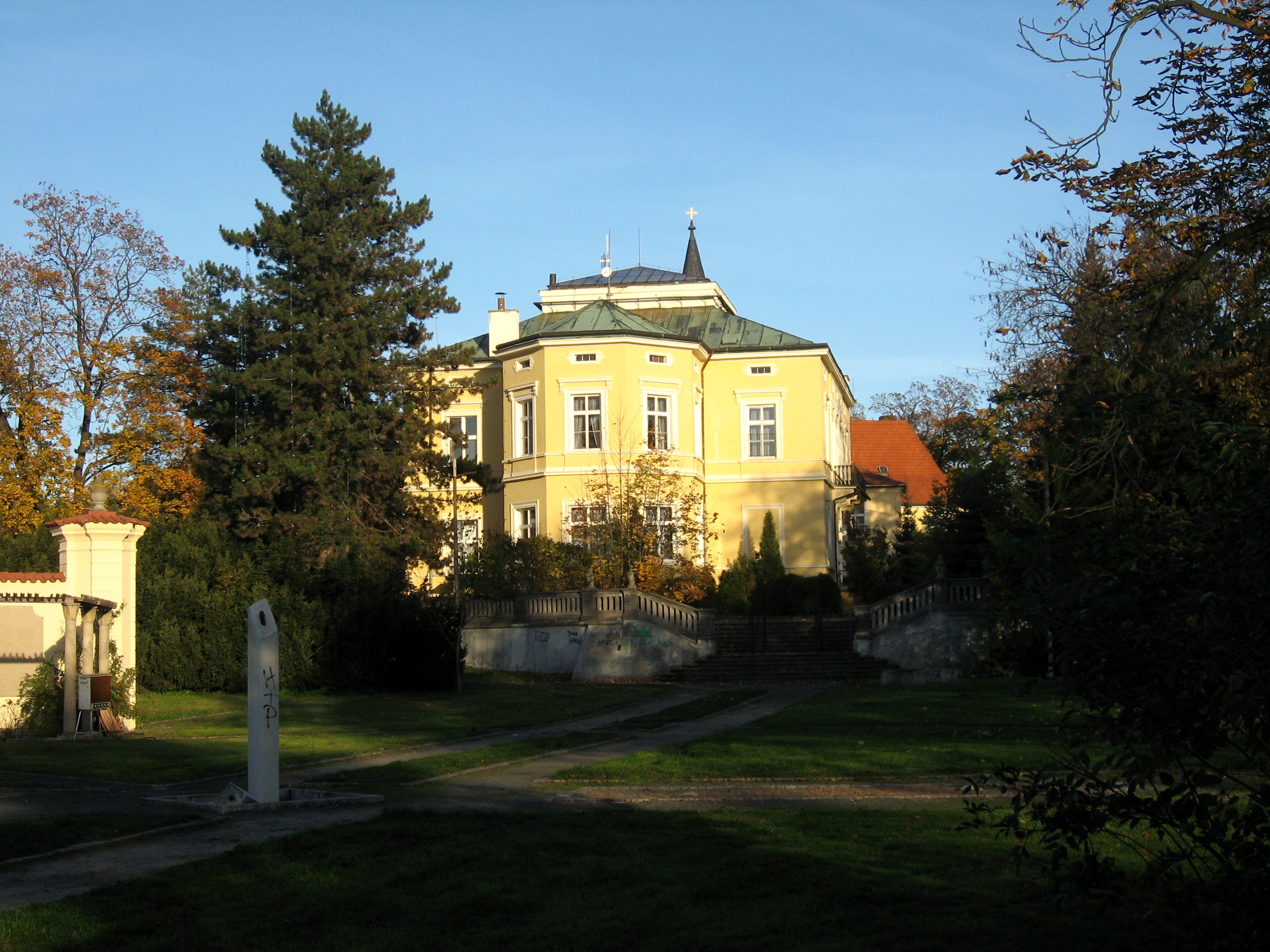 Dolní Počernice, zámek